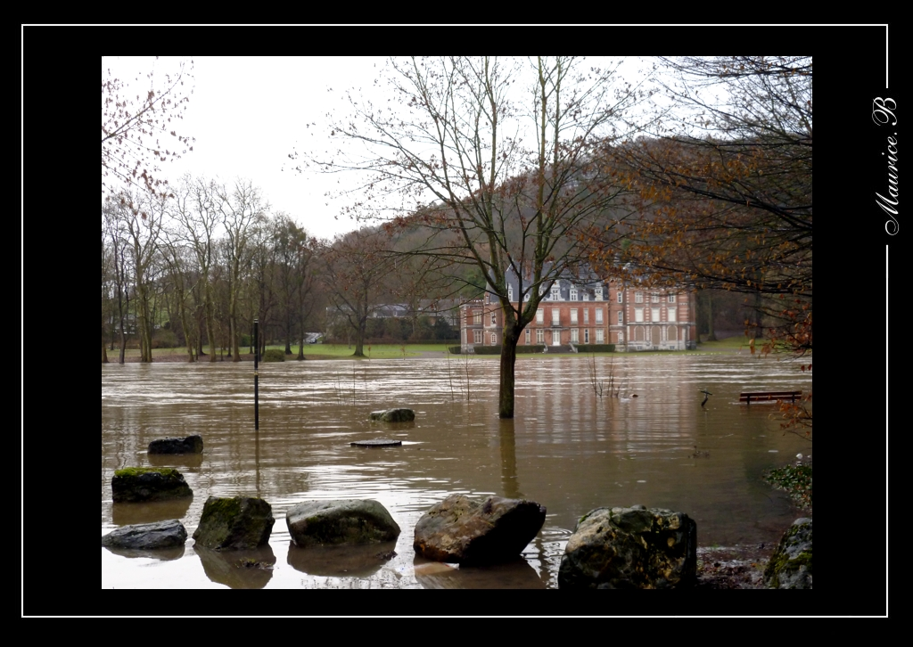 En bordure de la Meuse, dans un grand parc boisé, rougeoie le château de Dave ou château de Fernan-Nunez.Au 16°s. La seigneurie de Dave, nommée « vicomté de Dave » échoit par mariage au duc de Barbençon. Au 17°s, il devient propriété des Ligne et d’Arenberg, et le domaine dans son intégralité, malgré la révolution française, par succession féminine revient à Carlos Guttierez de Los Rios, duc de Fernan Nunez. La famille s’est maintenue à Dave jusqu’à nos jours y faisant de fréquants séjours. Cette construction du 17e siècle, de briques rouges encadrées de pierre bleue, est remaniée au 18e et amplifiée au 19e siècle. Le château remplace une forteresse médiévale construite auparavant sur les hauteurs.